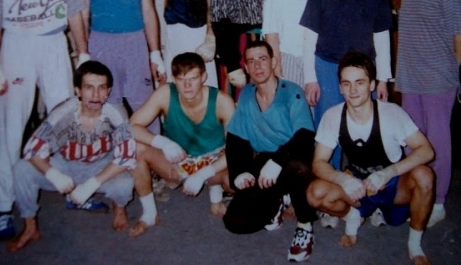 GLADIATOR GYM Dubnica nad Váhom 1995